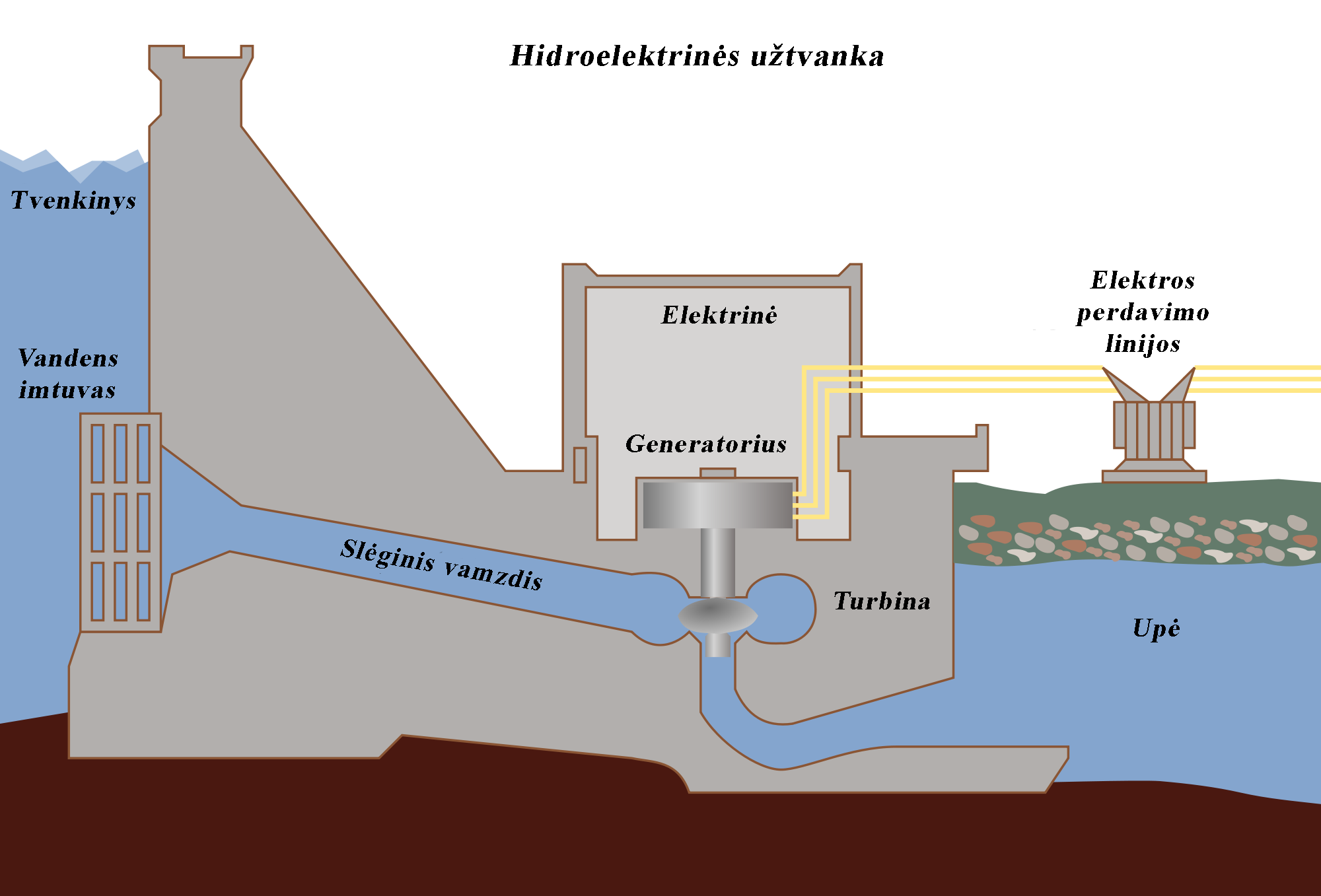 Hidroelektrinės užtvanka